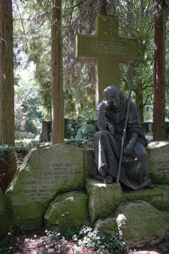 Grab von Adolf Richter (1839-1914), Chemiker und Pionier der Friedensbewegung in Deutschland, auf dem Pforzheimer Hauptfriedhof.